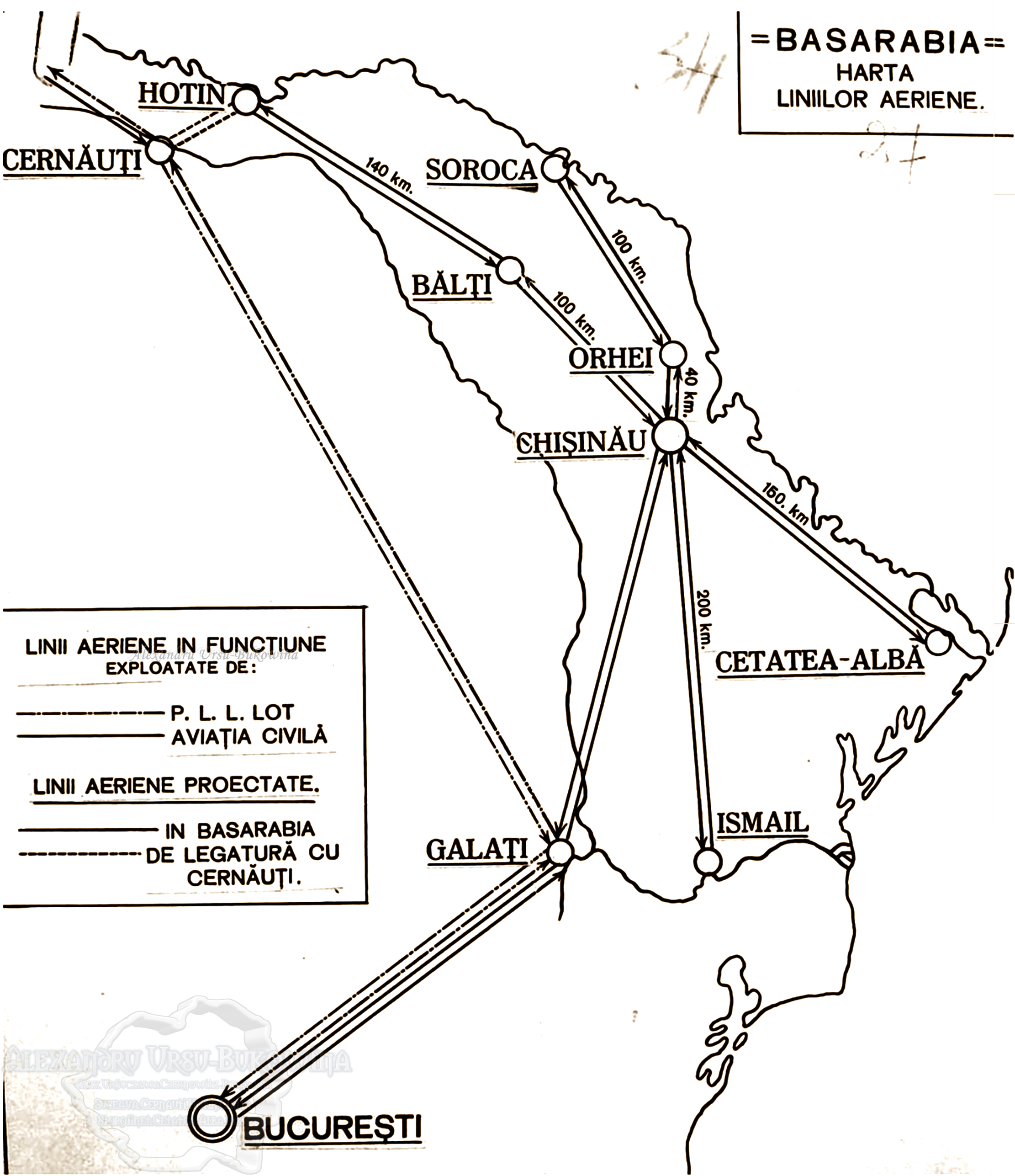 Harta liniilor aeriene din Basarabia - perioada interbelică